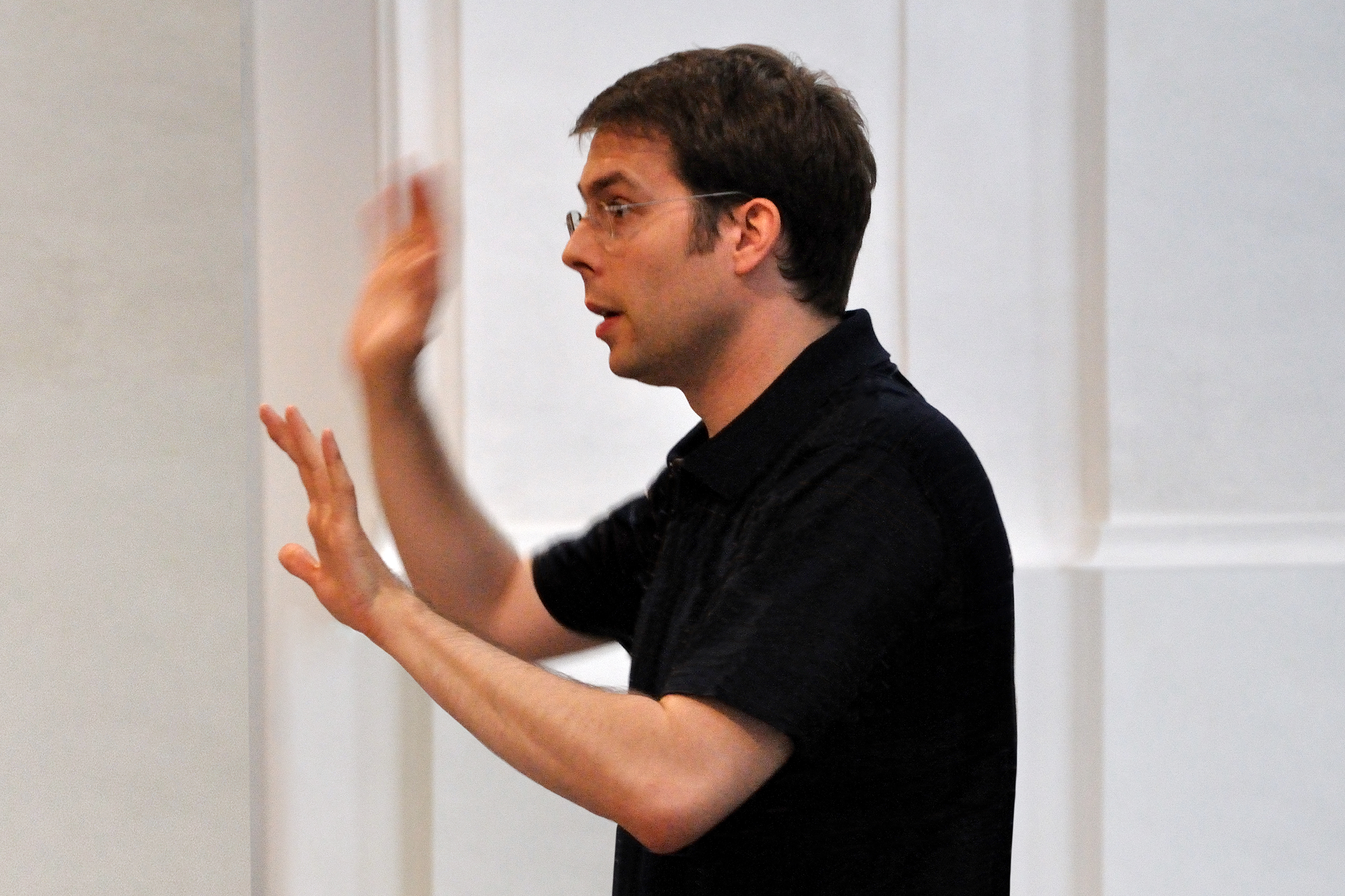 Diözesanmusikdiretor Dr. Marius Schwemmer, Passau 2009.